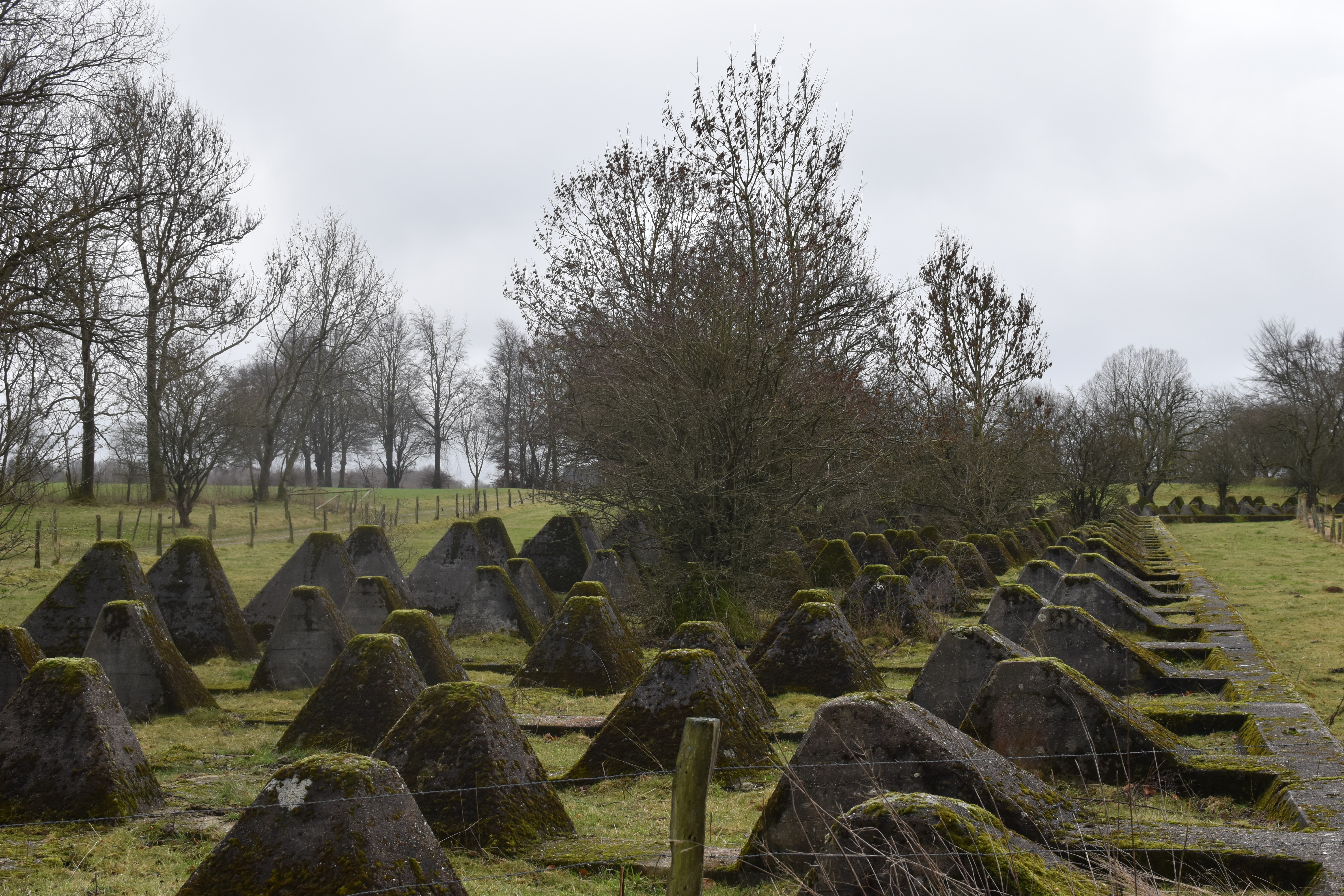 Drakentanden van de Siegfriedlinie, nabij Simmerath